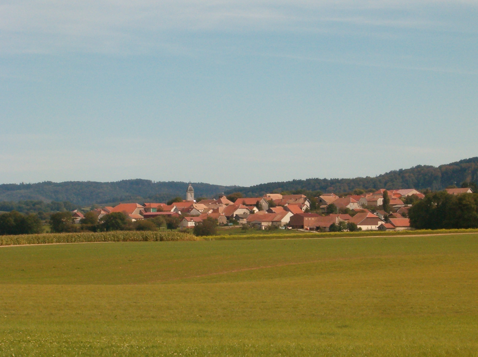 Bolandoz 25 - Vue depuis le plateau d'Amancey